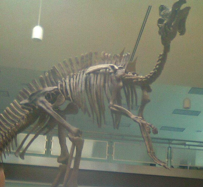 Reconstrucción del esqueleto de un Magnapaulia en el Museo del desierto de Delicias México